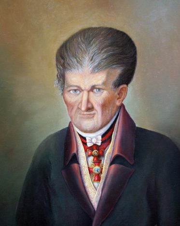 Иван Андреевич Гейм (1759–1821) — ректор Московского университета в 1808–1819 гг.